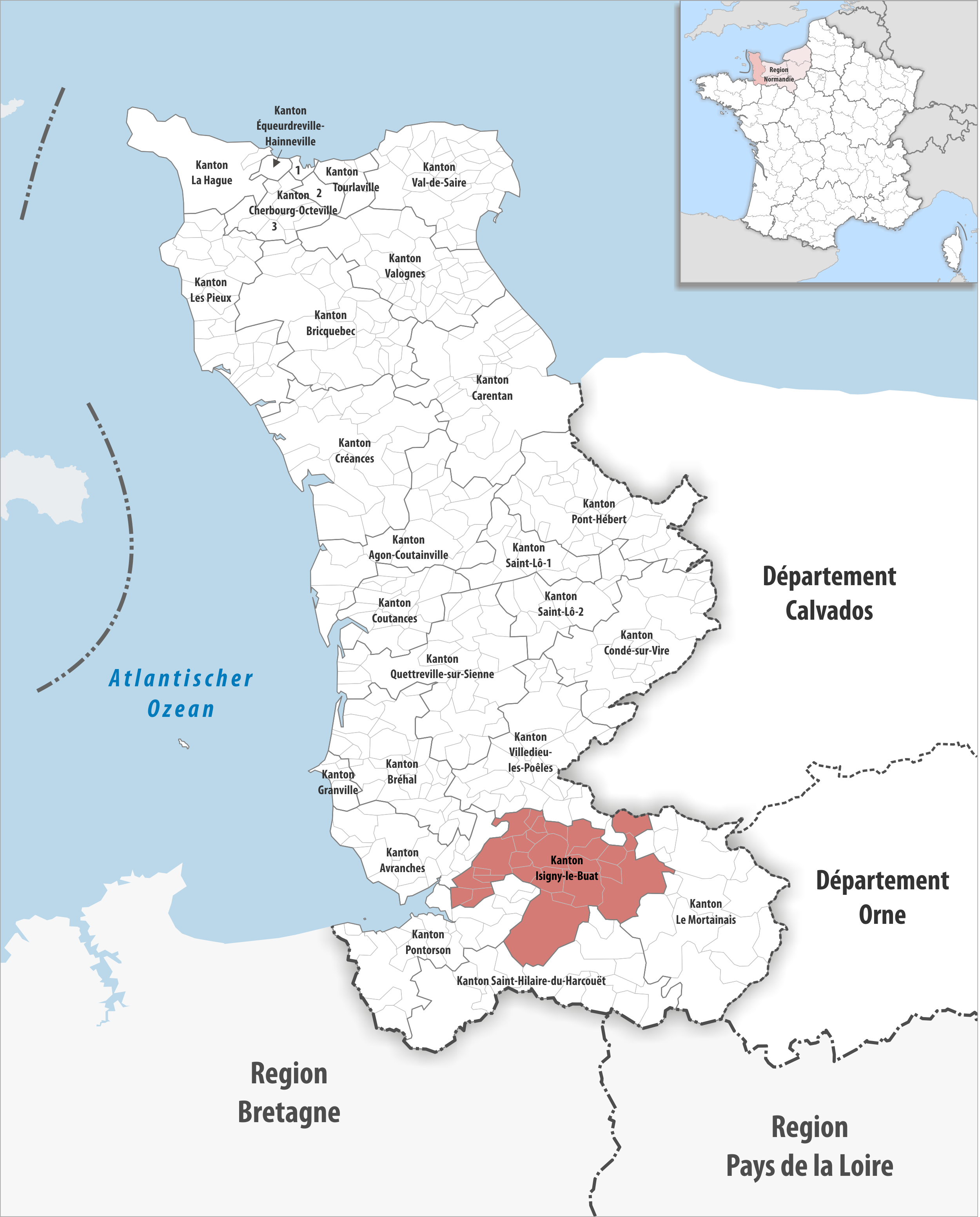 Lage des Kantons Isigny-le-Buat